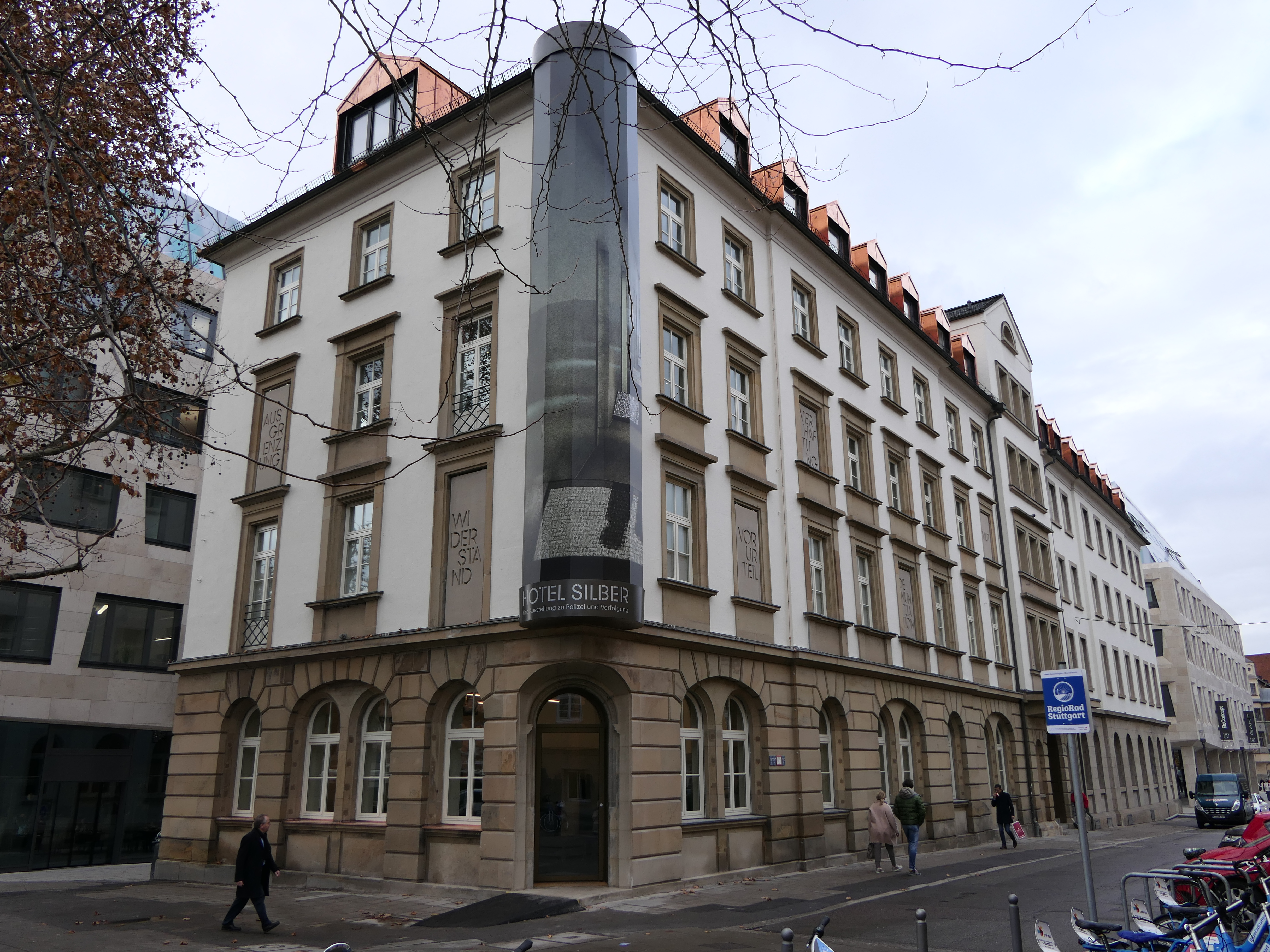 Das Hotel Silber in Stuttgart, nach seinem Umbau.